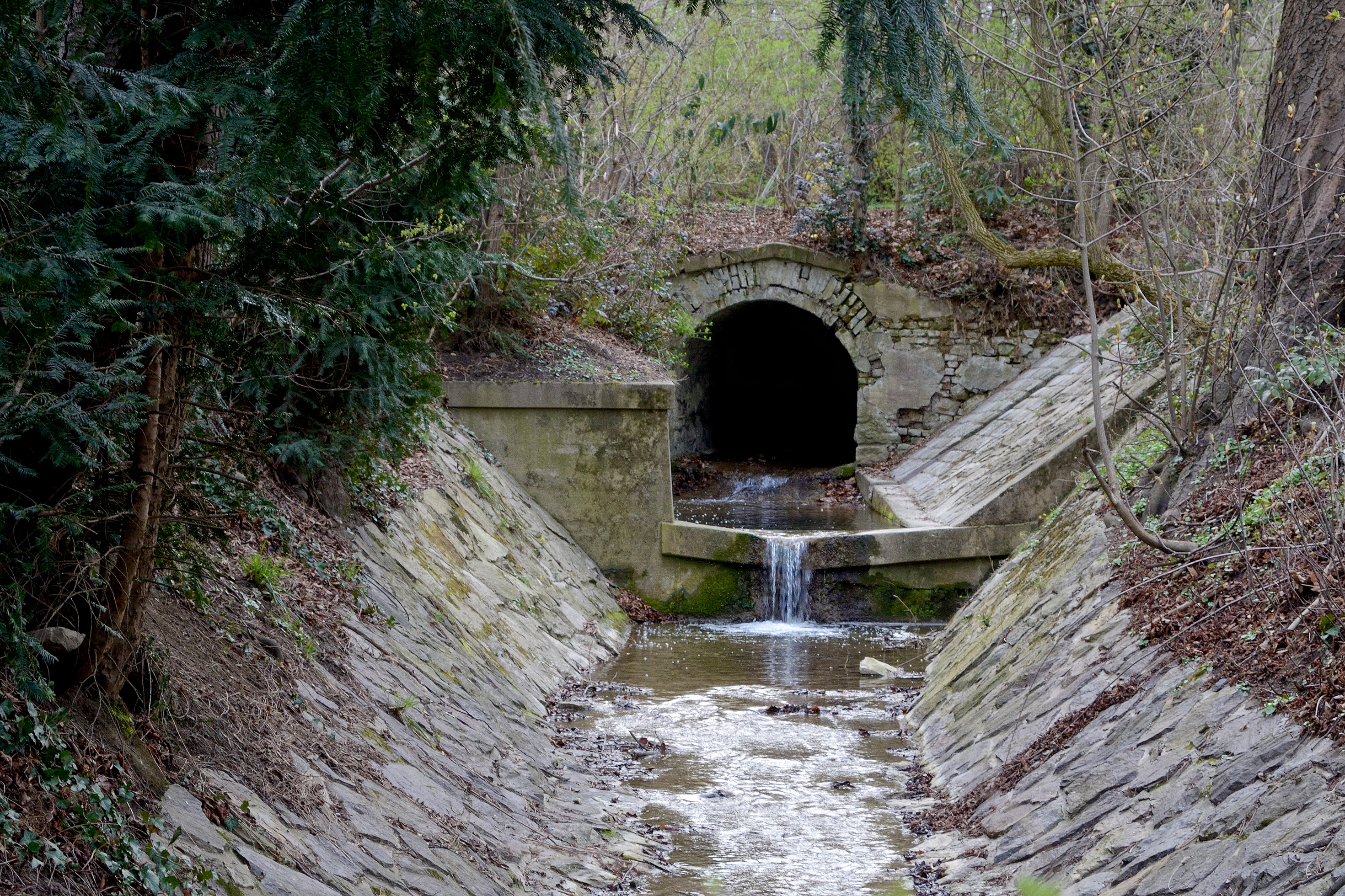 Unterirdischer Teil des Schreiberbaches nahe dem Beethoven-Denkmal.